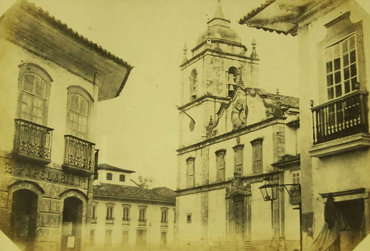 Sé, São Paulo